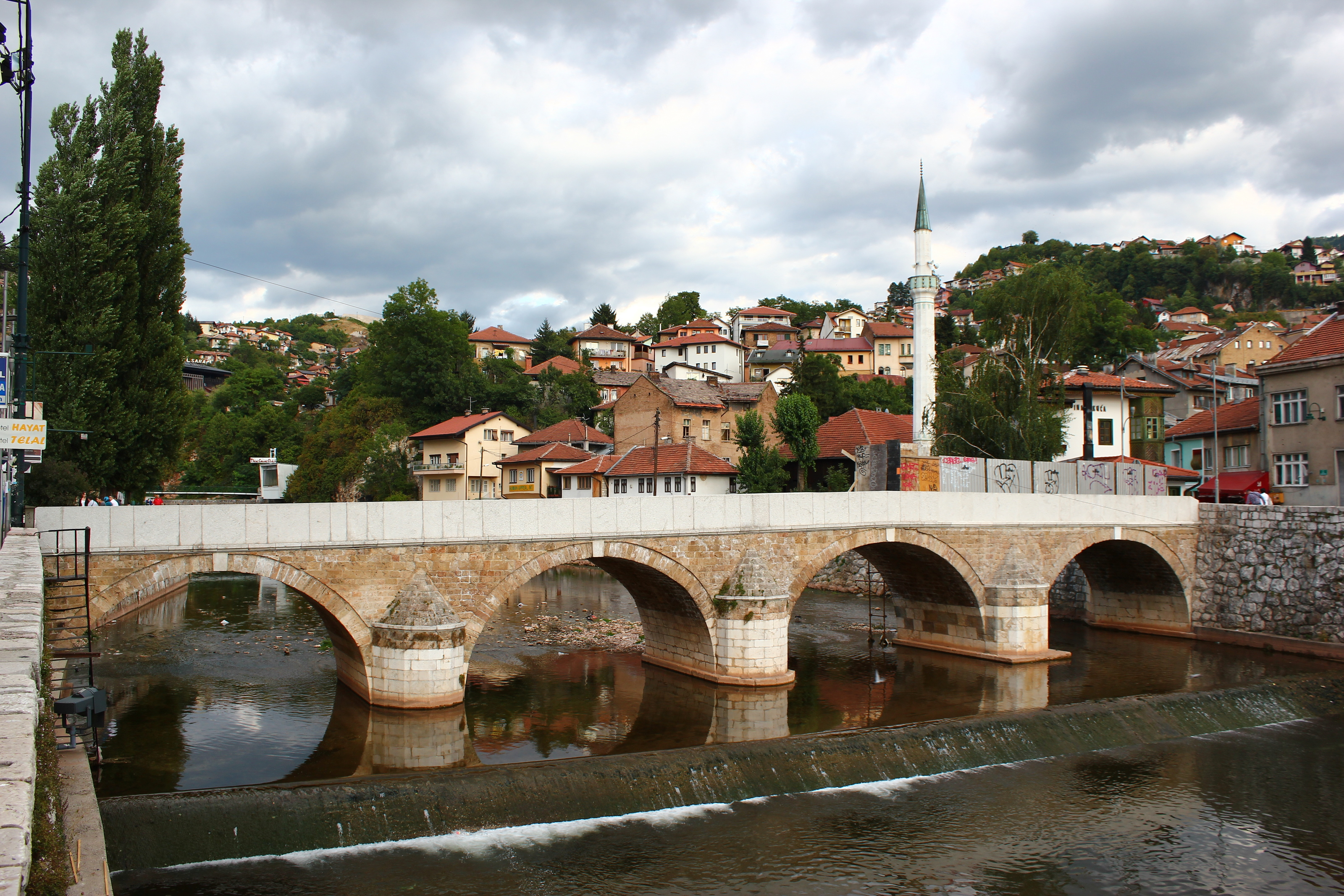 Die Šeher-Ćehaja-Brücke über die Miljacka in Sarajevo.